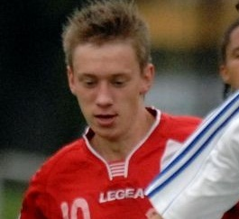 Sinicins